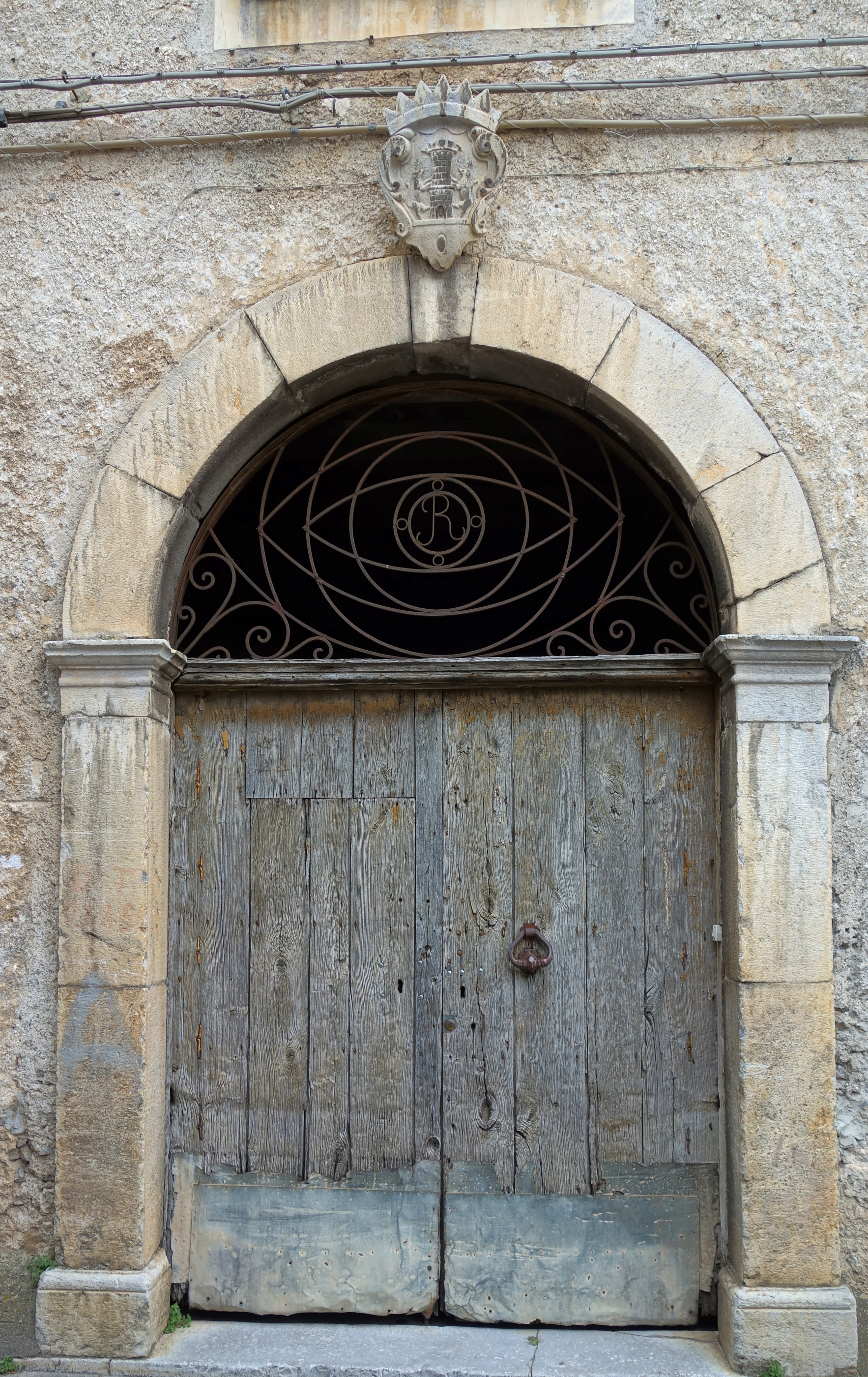 Porte du Palazzo Rocco à Morano Calabro.